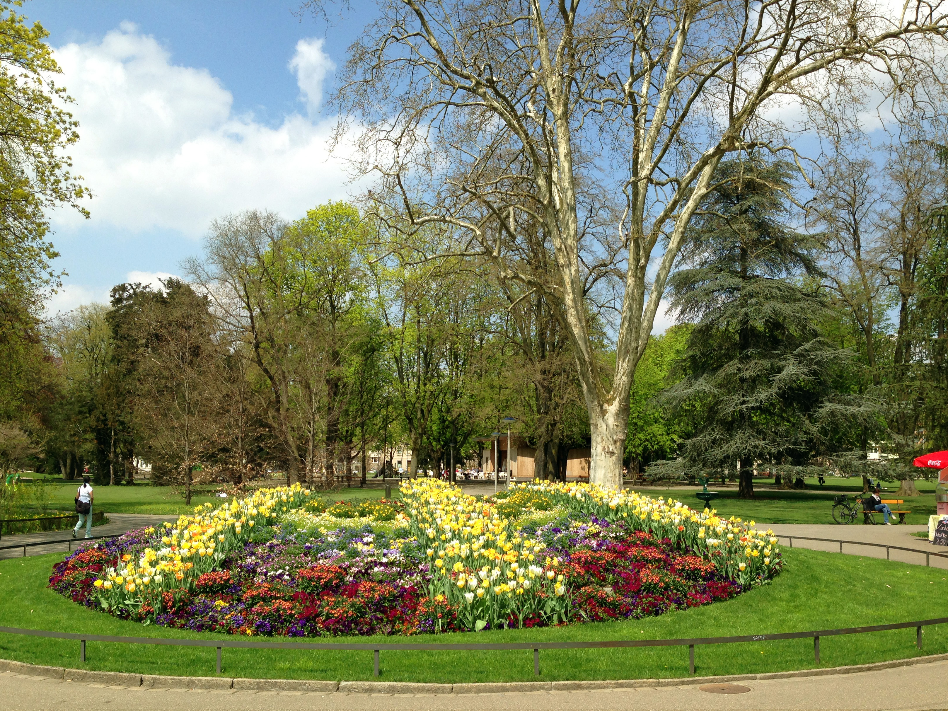 Blumenpracht beim Eingang vom Bundesplatz her in den Schützenmattpark Basel